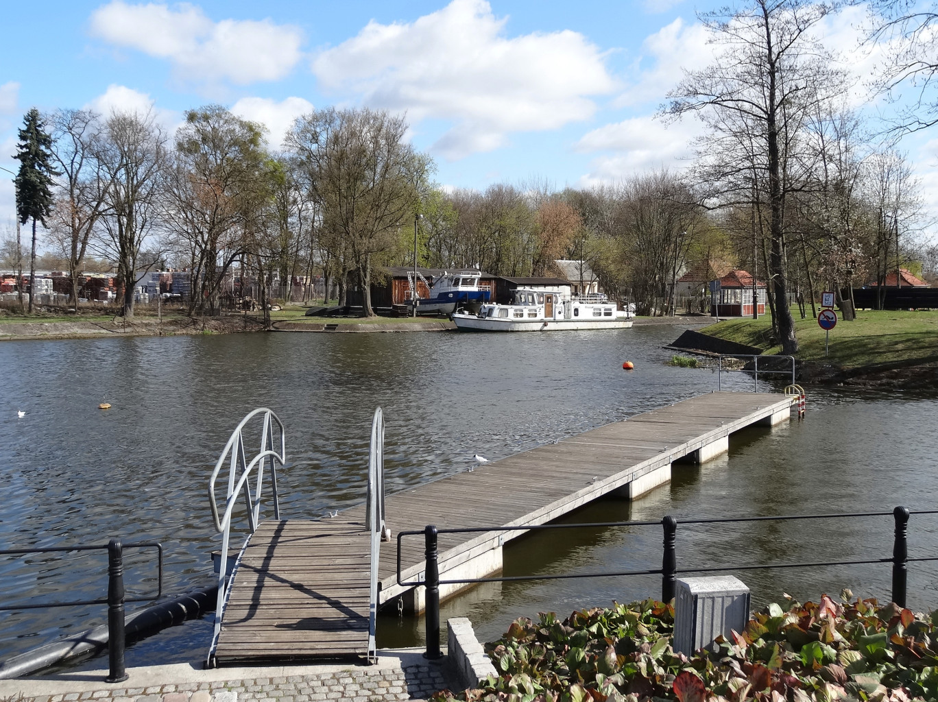 Marina Gwiazda na Kanale Bydgoskim przy ul. Bronikowskiego w Bydgoszczy